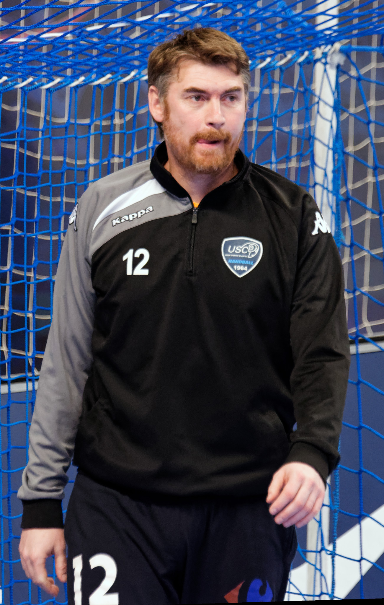 Rencontre de LNH entre le PSG et l'US CRéteil. A Coubertin, le 25 novembre 2015.